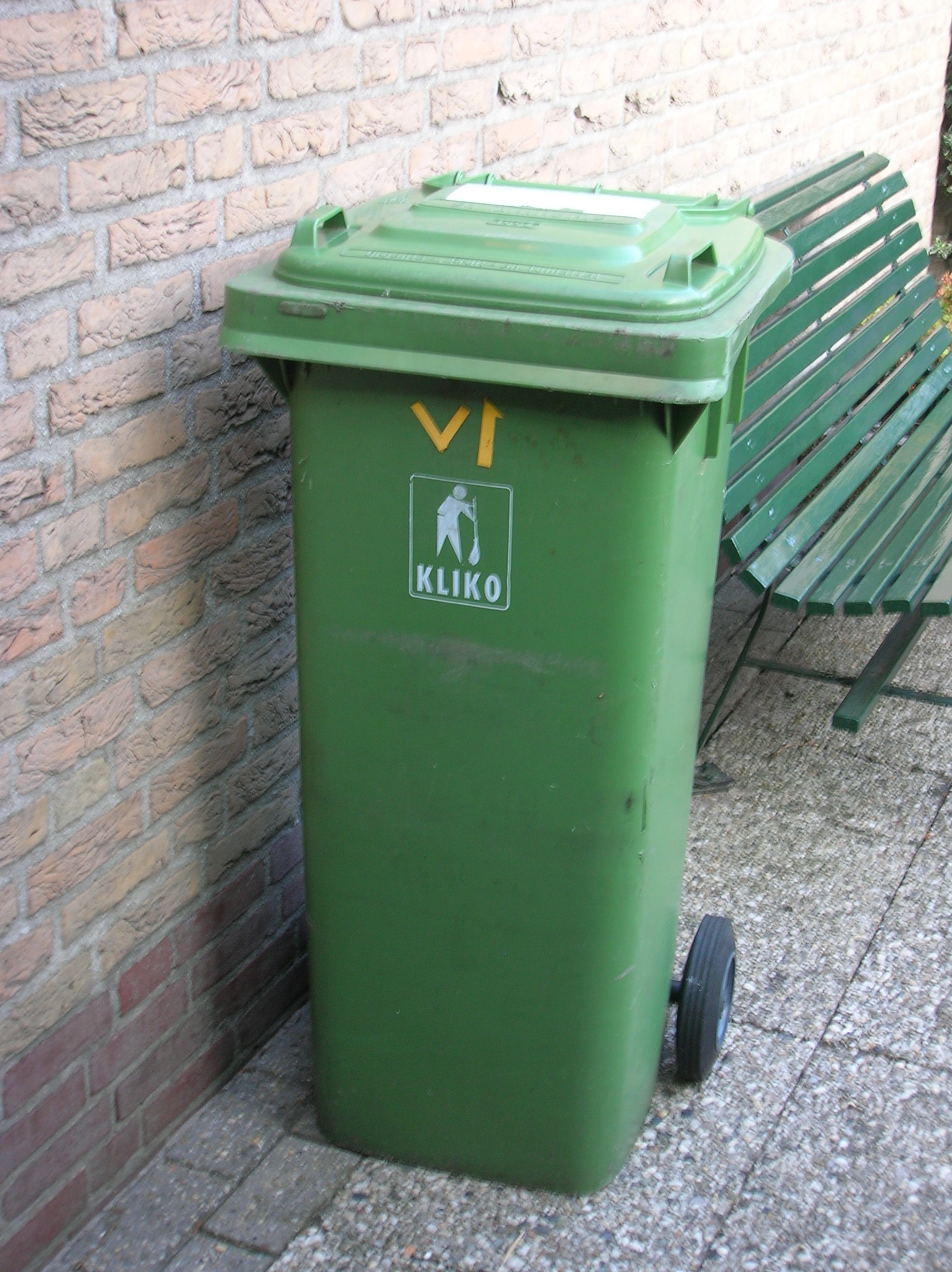 Zefgemaakte foto, 11 juli 2006: een groene afvalbak voor het verzamelen van gft-afval.